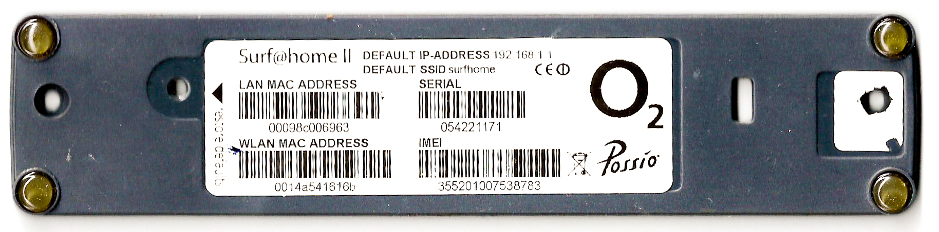 UMTS Router Surf@home II, verkauft von O2 Foto: Aufkleber auf der Unterseite mit Angabe der MAC-Adressen für LAN und WLAN, Seriennummer und IMEI